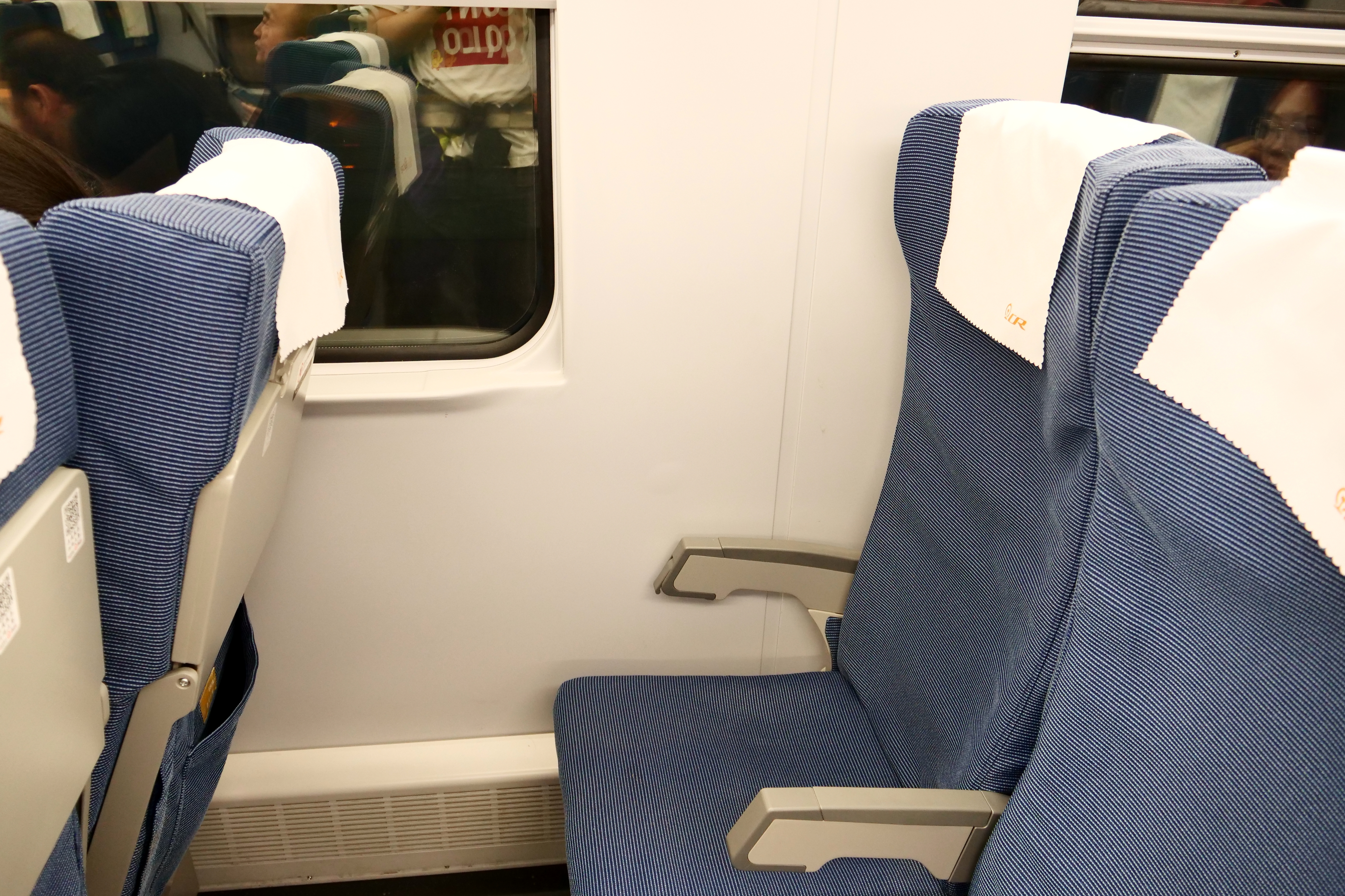 CR200J